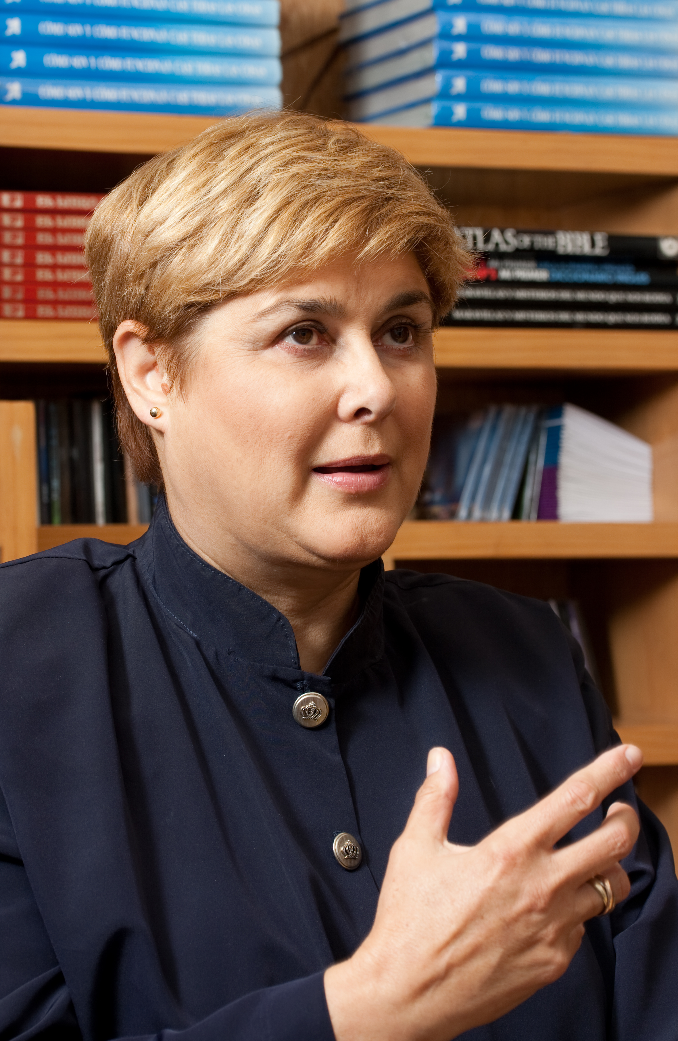 Cecilia Blanchet, fundadora de Ministerios de Amor A.C.